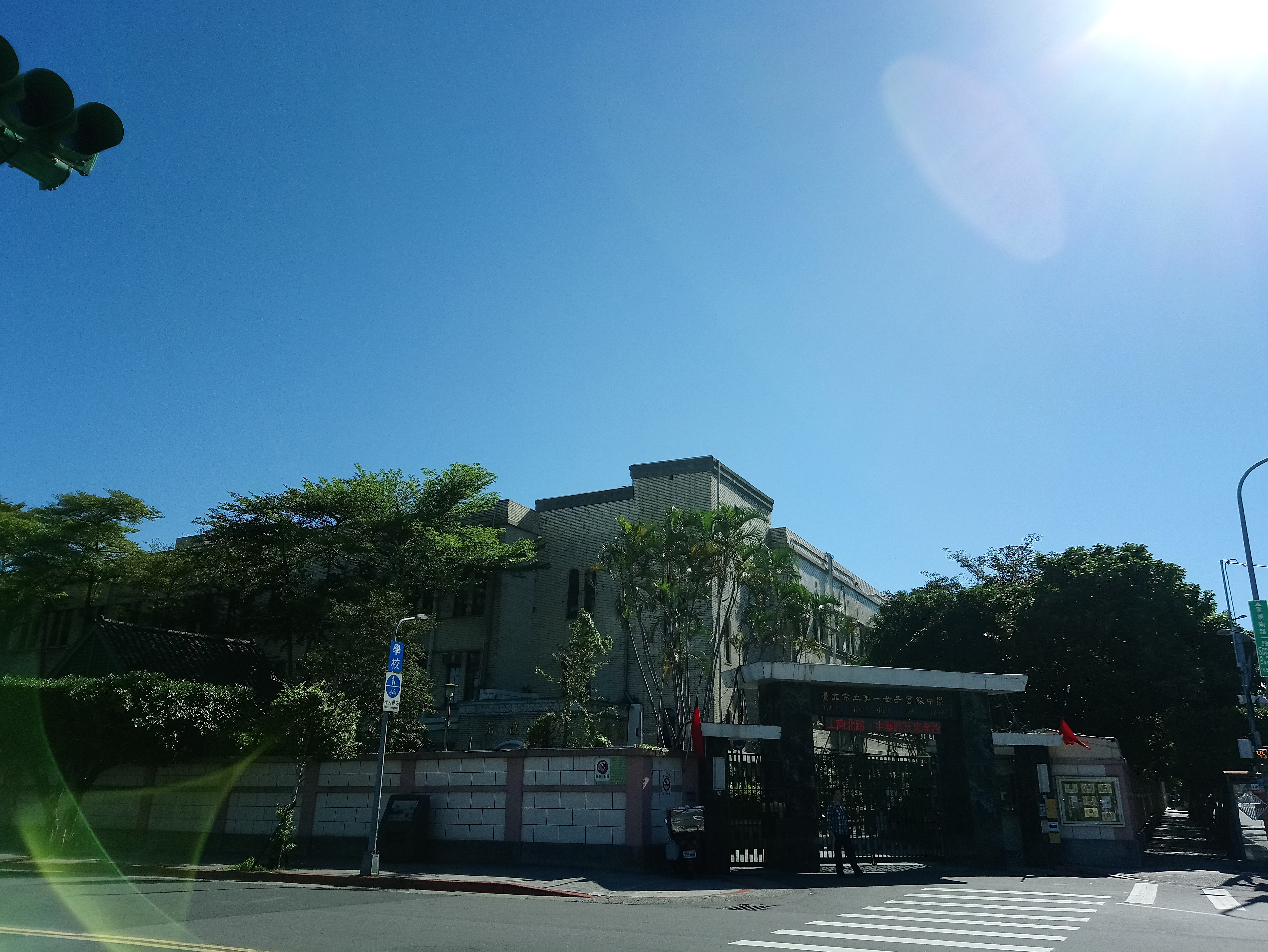 臺北州立臺北第一高等女學校,臺北市中正區城內次分區建國里